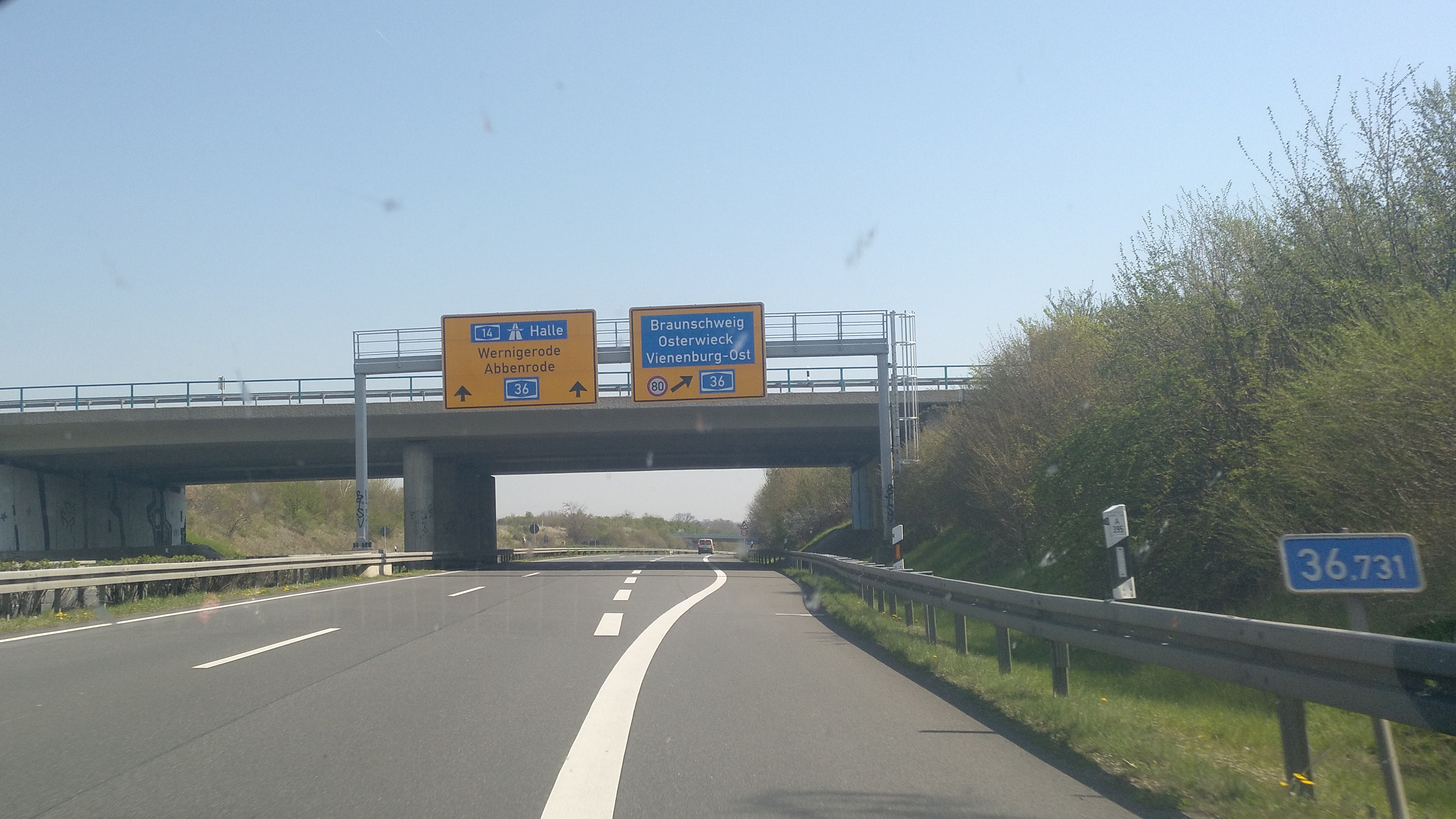 Einmündung in die A 36 Richtung Halle (Saale). Auffällig ist die hier angezeigte Kilometrierung und die Beschriftung "A 395" auf dem Pfosten im Vordergrund.